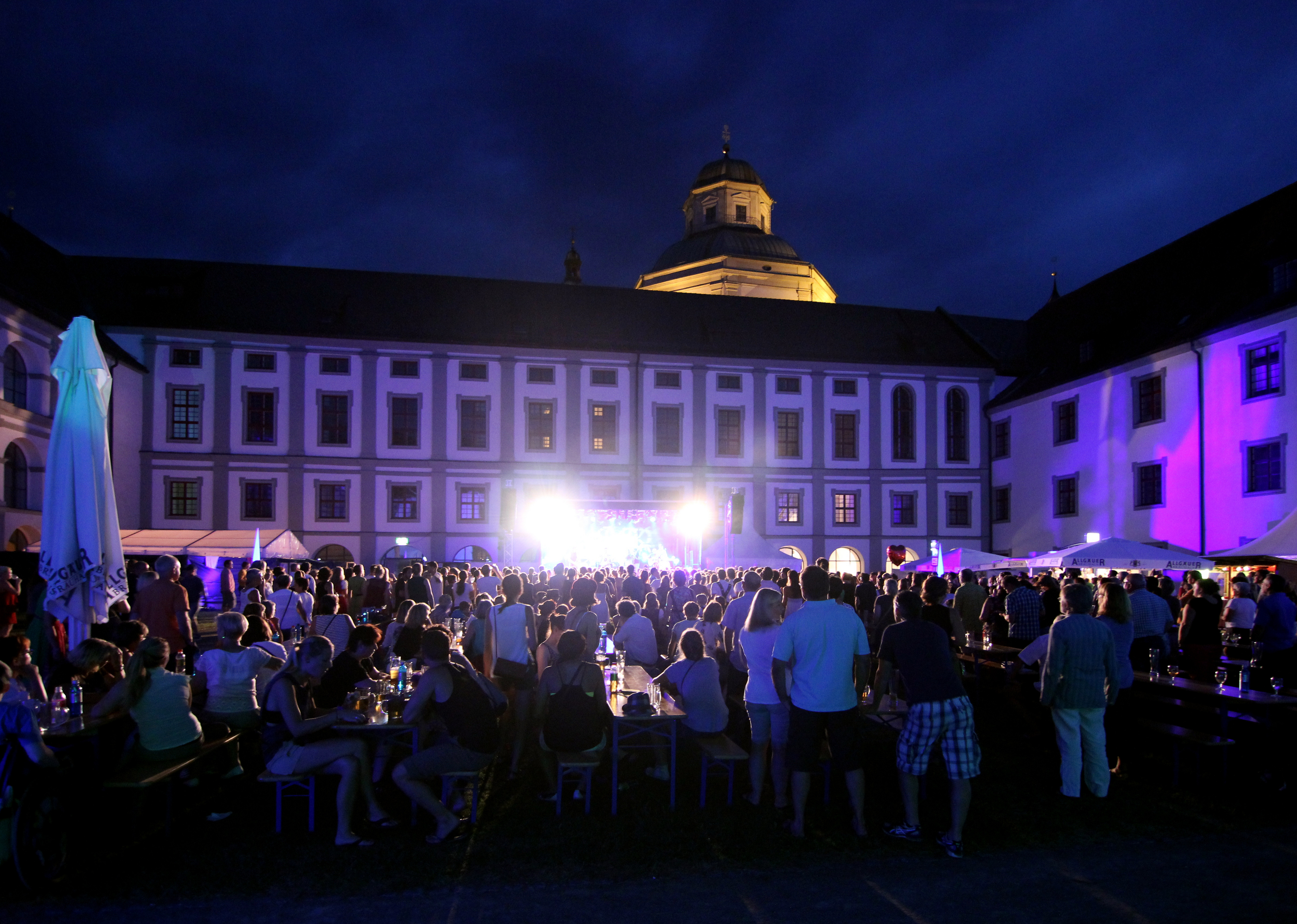 Konzert im Innenhof der Fürstäbtlichen Residenz in Kempten